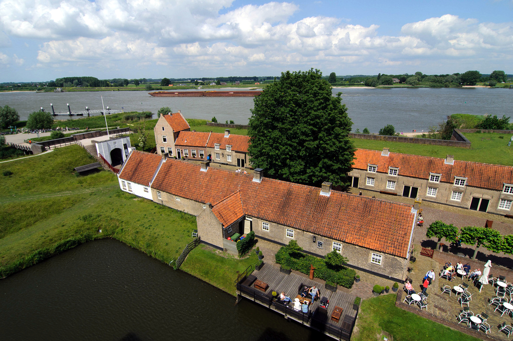 Zicht vanaf slot Loevestein over de Waal en de barakken.